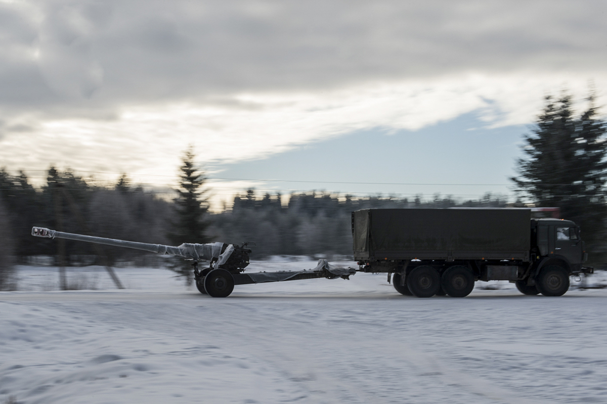 Тренировка курсантов Михайловской военной артиллерийской академии в стрельбе из артиллерийских орудий и вождении военной техники.